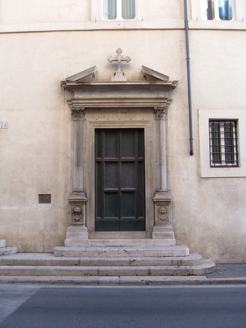 Il portale d'ingresso della chiesa dei Santi Gioacchino e Anna alle Quattro Fontane, a Rome, nel rione Monti.